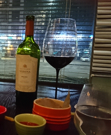 레드와인